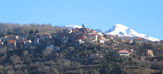 Vue du village de Belvédèredepuis Roquebillière